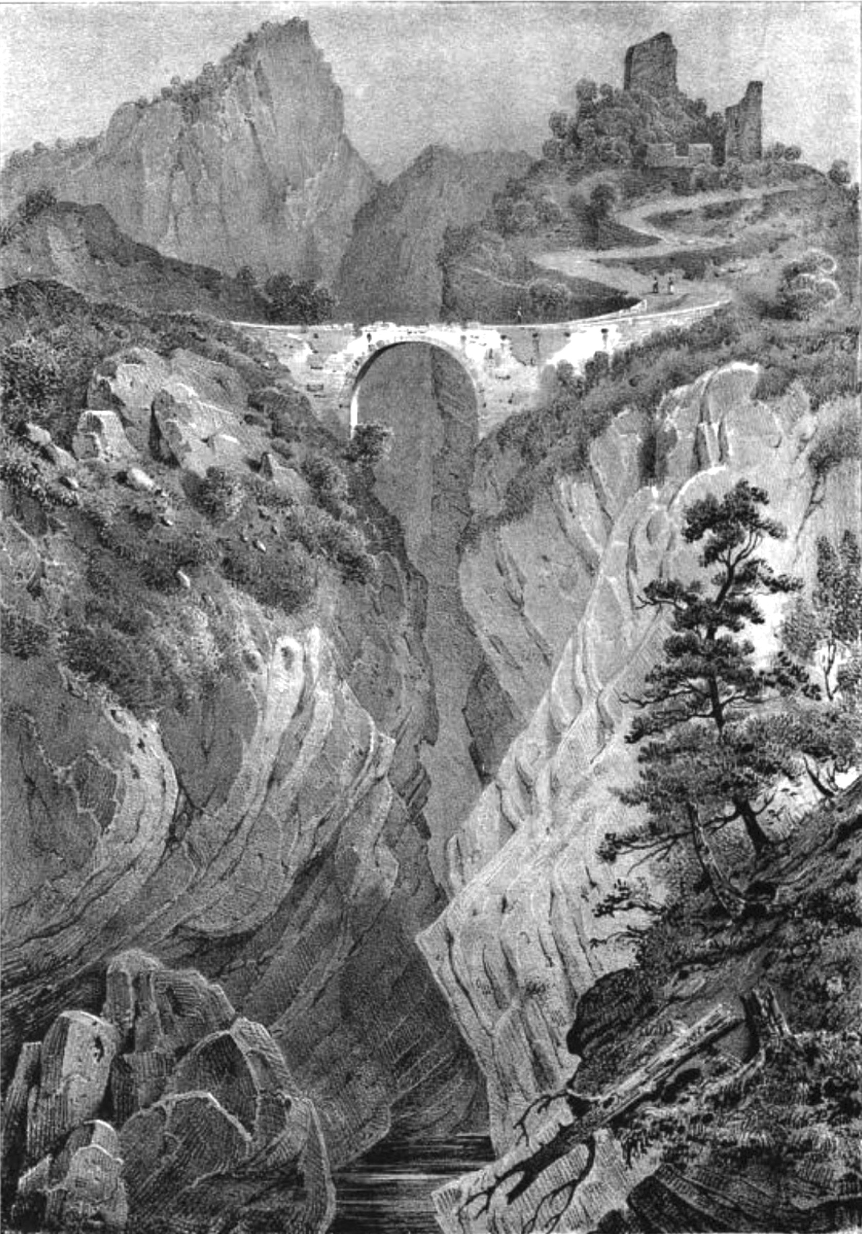 Album du Dauphiné - tome III, litographie du Pont de Brion, Isère